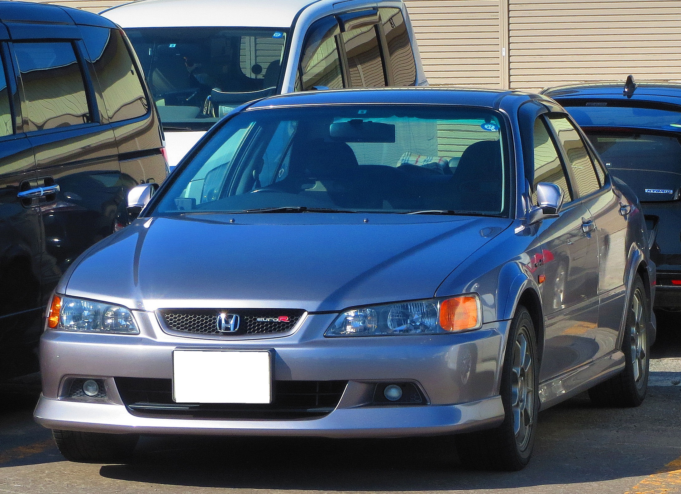 ホンダ・アコードユーロR(CL1)